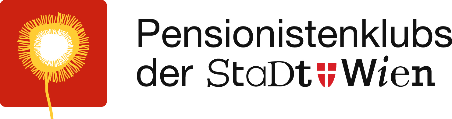 Logo der Pensionistenklubs der Stadt Wien